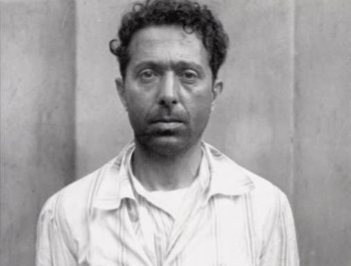 Miguel Arcángel Roscigna detenido.